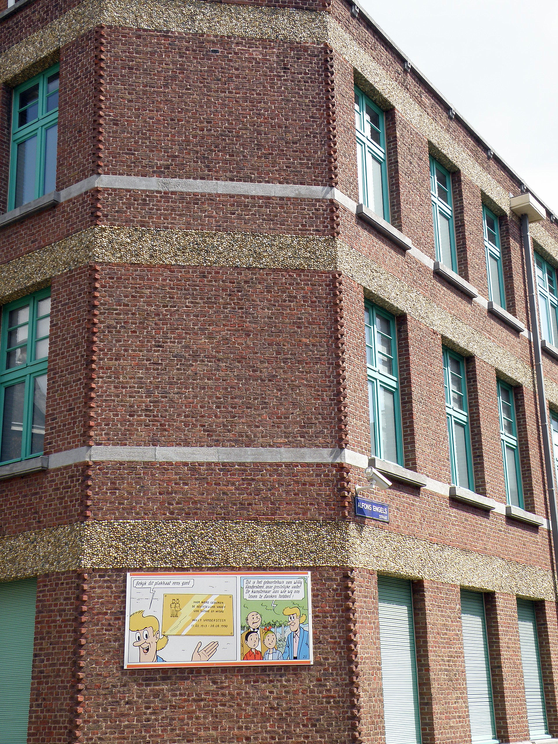 Antwerpen, België. Geboortehuis Willy Vandersteen, hoek Stuivenbergplein/Alfons Engelsstraat, in de wijk Stuivenberg, deel van de 'Seefhoek'. Huis maakt deel uit van gebouwencomplex rond zwembad Sportoase, met hoofdingang aan de Veldstraat. Ontwerp van archit. Emiel van Averbeke en Jan van Asperen.